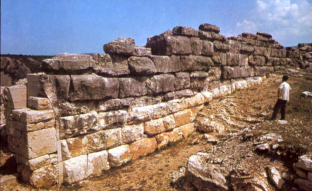 Zidine Ilirskog grada Dorsona u Ošanićima kod Stoca. Oko 3. st. pr. Kr.